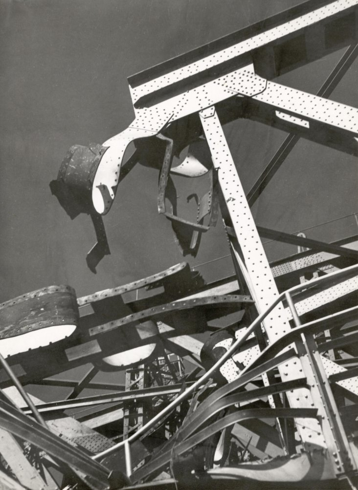 Door bombardementen vernielde brug over de Rijn te Arnhem tijdens de slag om Arnhem. September 1944 Collectie: Spaarnestad Photo / Anefo Fotograaf: Onbekende Anefo Fotograaf Datum: 09-1944 Fotonummer SFA003012905 Code: 1700-1 Voor meer informatie en foto's uit deze en andere collecties bezoek